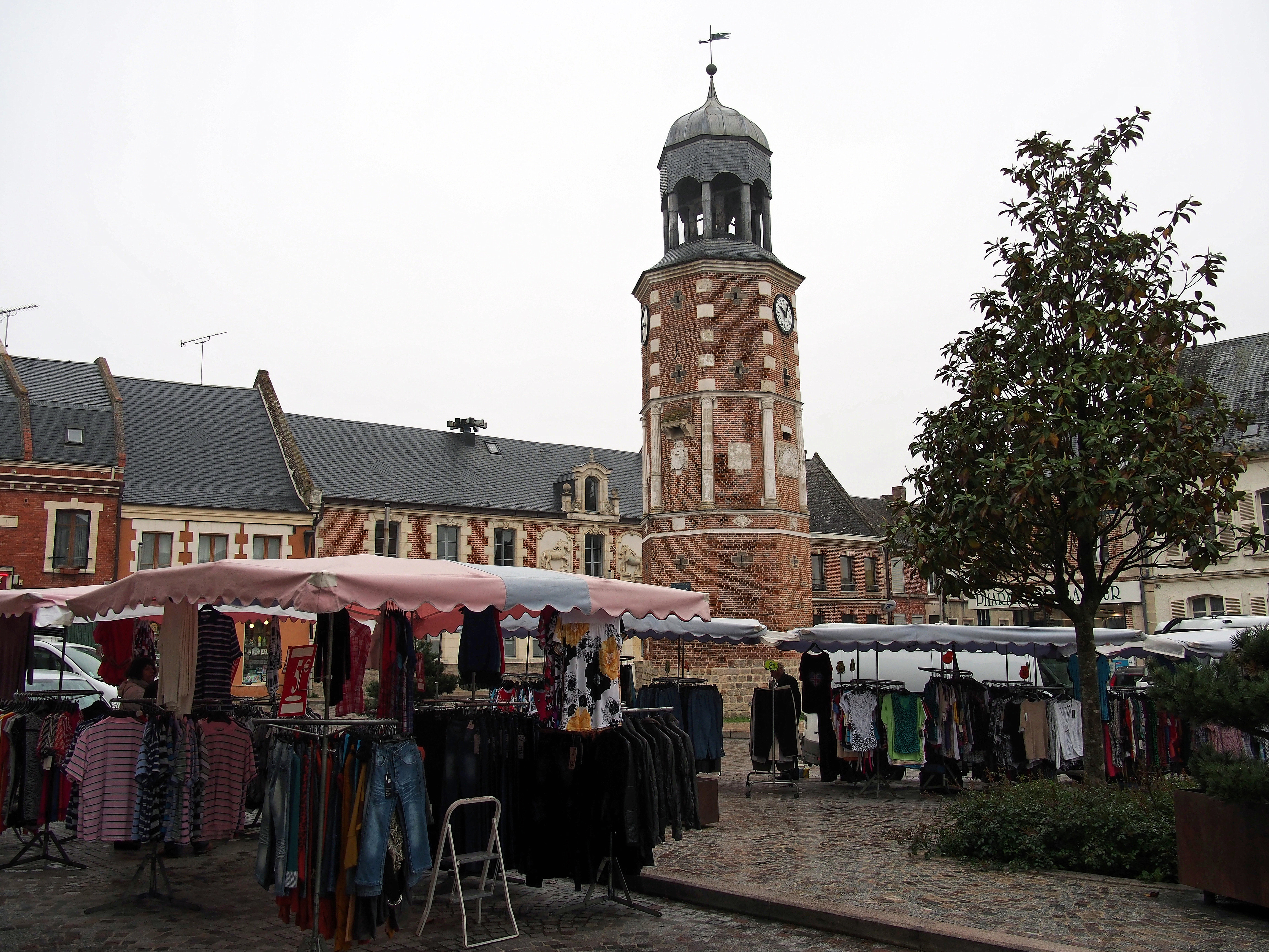 Tour de Crécy, (Classé, 4 février 1921)